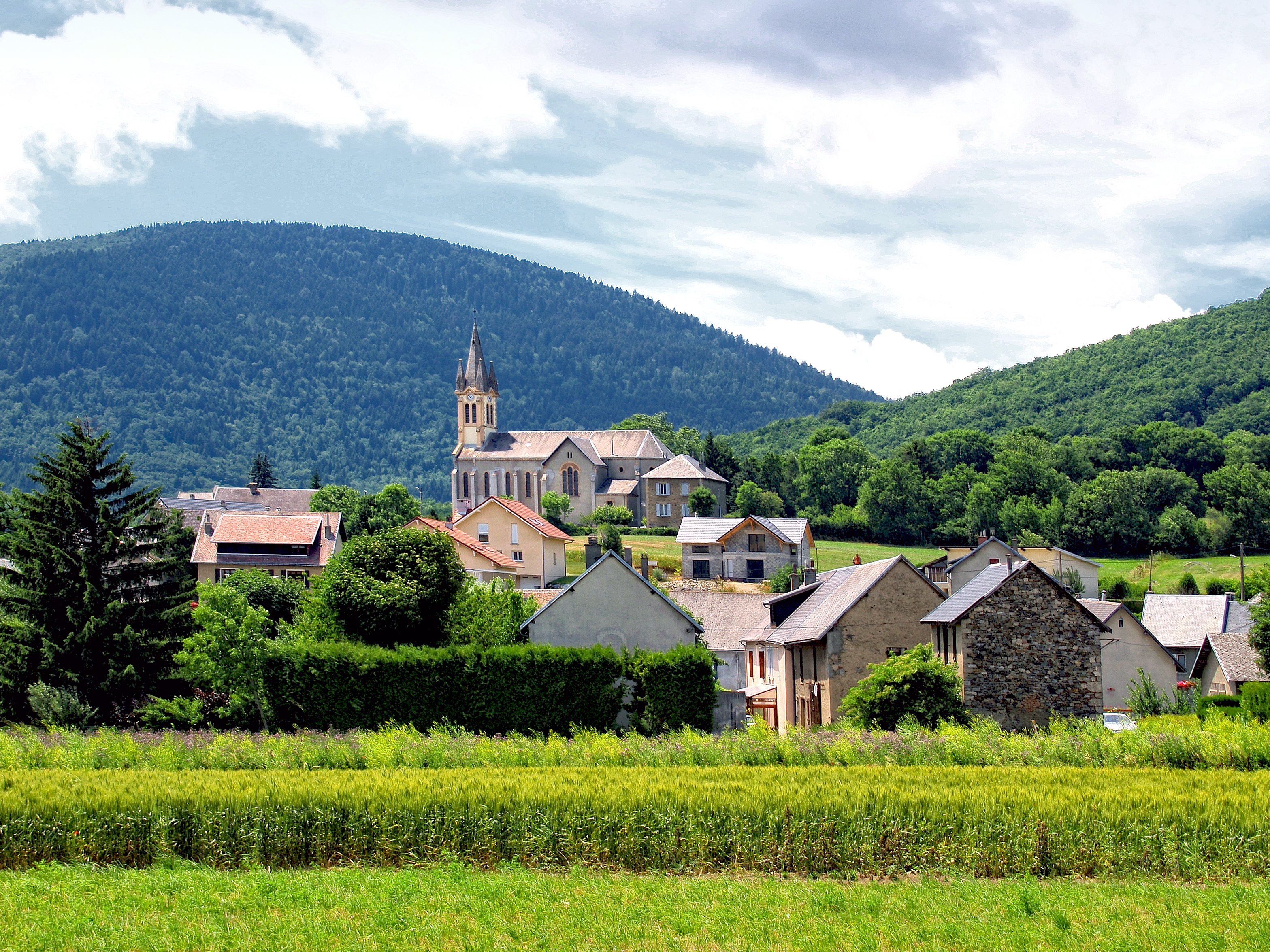 Pierre-Châtel Hameau de Feyteny